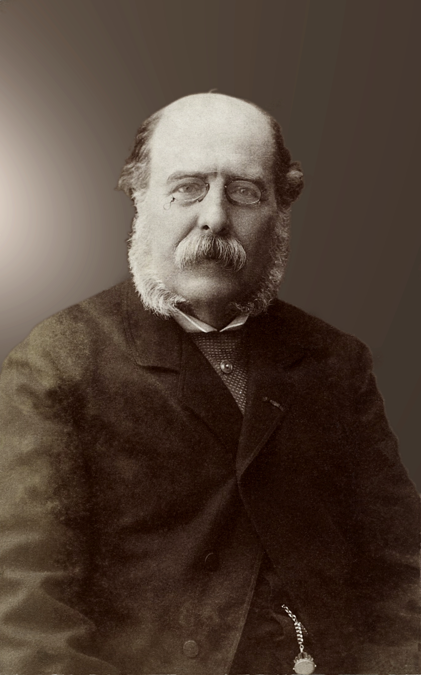 Charles Barbier de Meynard (1826-1908), linguiste, géographe et orientaliste français.